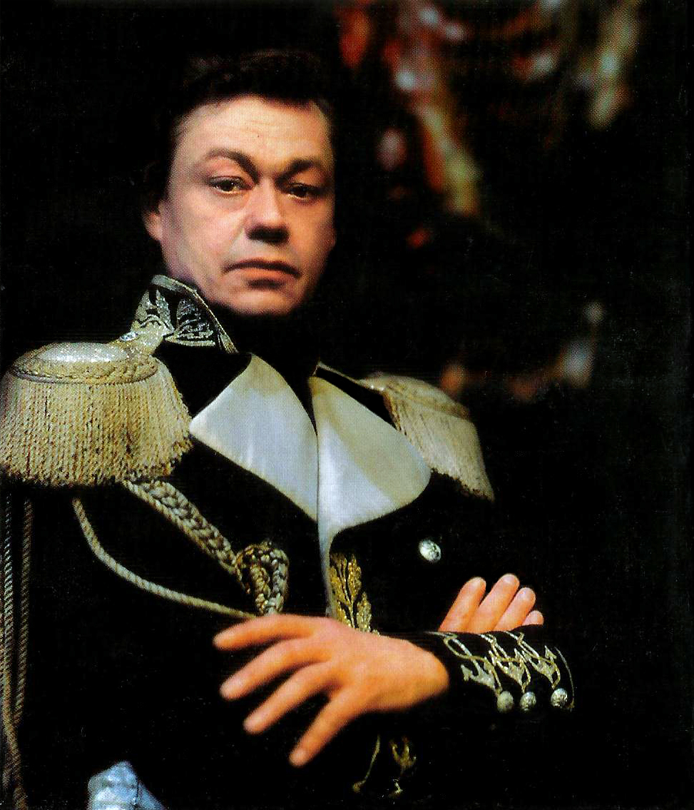 Николай Караченцов в роли графа Резанова в спектакле "Юнона и Авось".Фотография была сделана мной после спектакля в театре "Ленком".